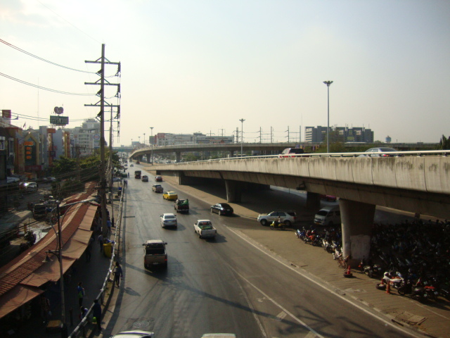 ทางหลวงหมายเลข346 มองจากทางแยกต่างระดับรังสิต